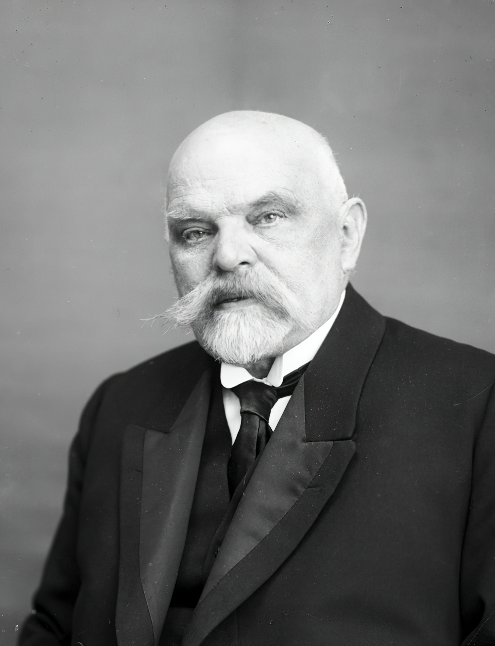 Paul von Vittorelli (1851–1932)